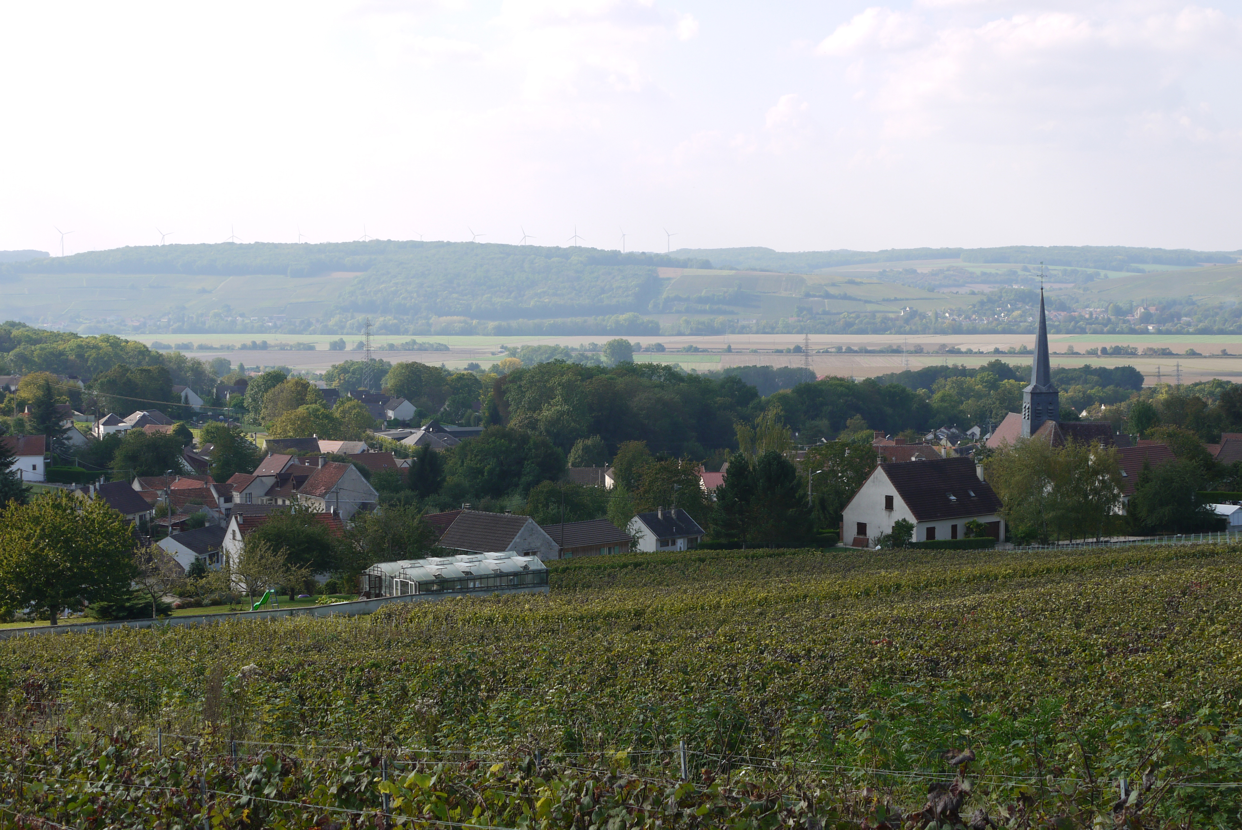 Vue du village, entre les vignes et la vallée de la Marne.